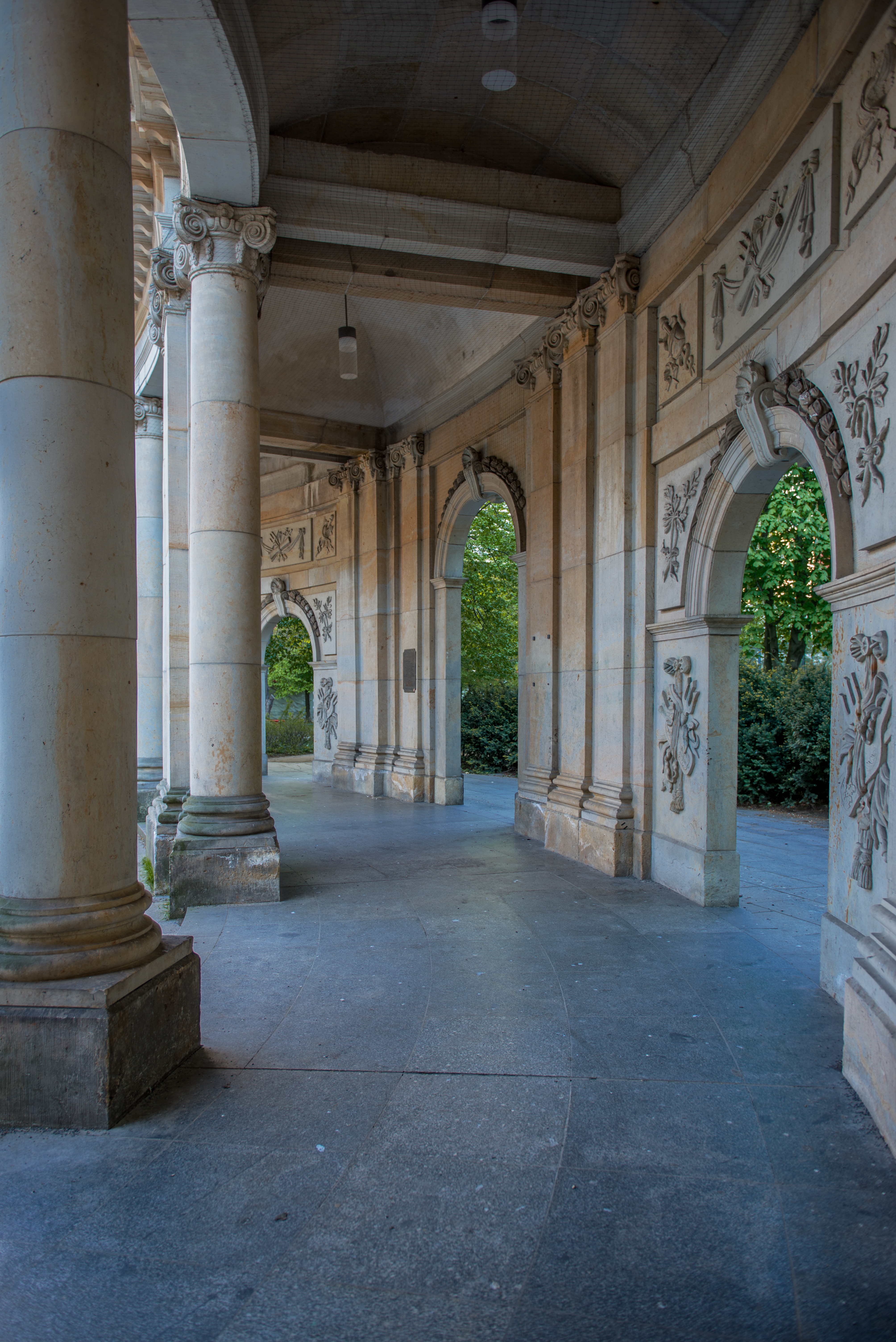 Spittelkolonnaden Arkaden